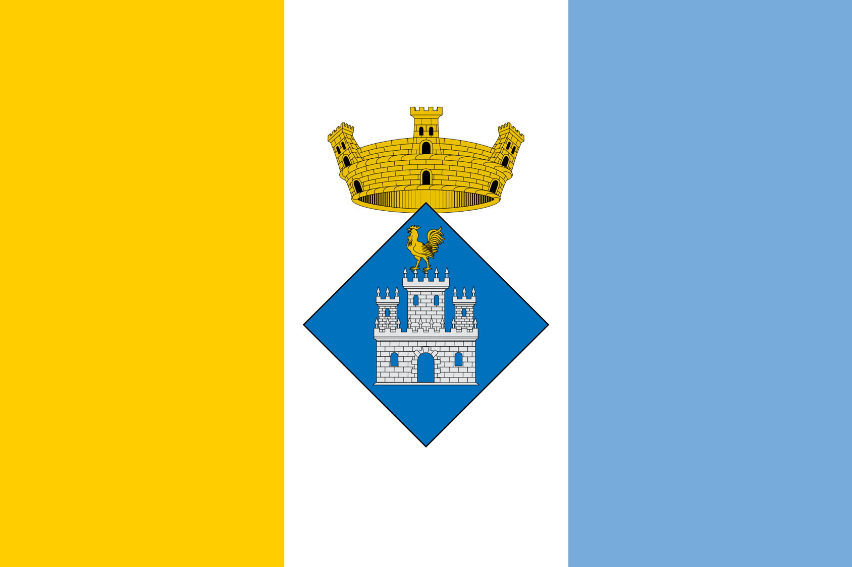 Bandera no oficial però en ús de Castellgalí